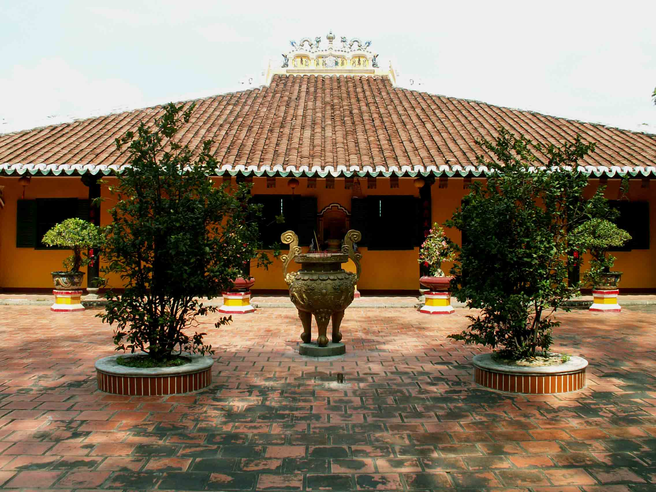 Chùa Giác Lâm, thành phố Hồ Chí Minh. Hình này do Phan Ba tự chụp vào tháng 12 năm 2005 và đưa vào phạm vi công cộng.